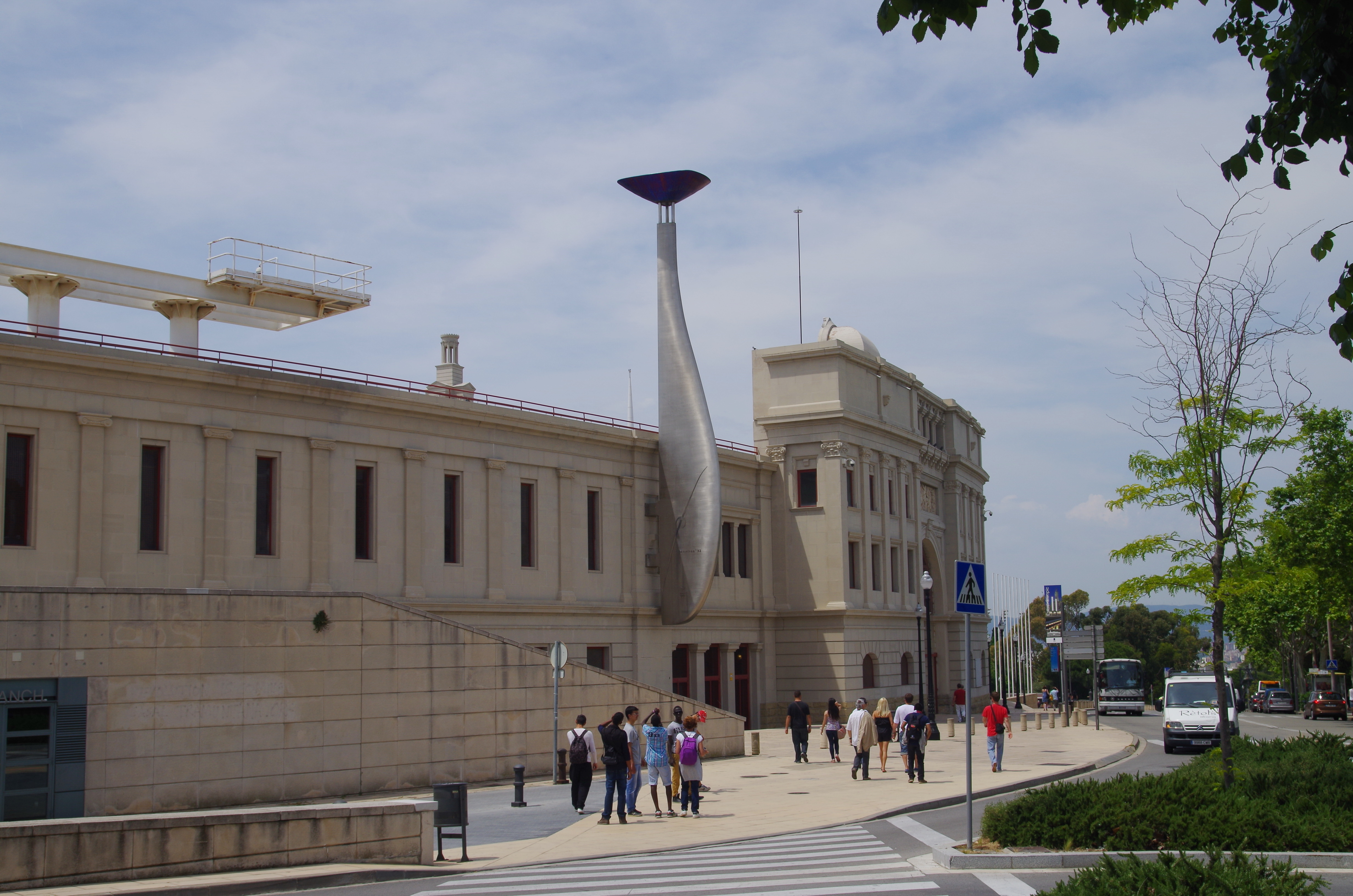 Barcelona:Olympiastadion aussen